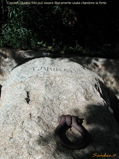 foto proveniente dal sito e come specificato nello stesso, di libero utilizzo.